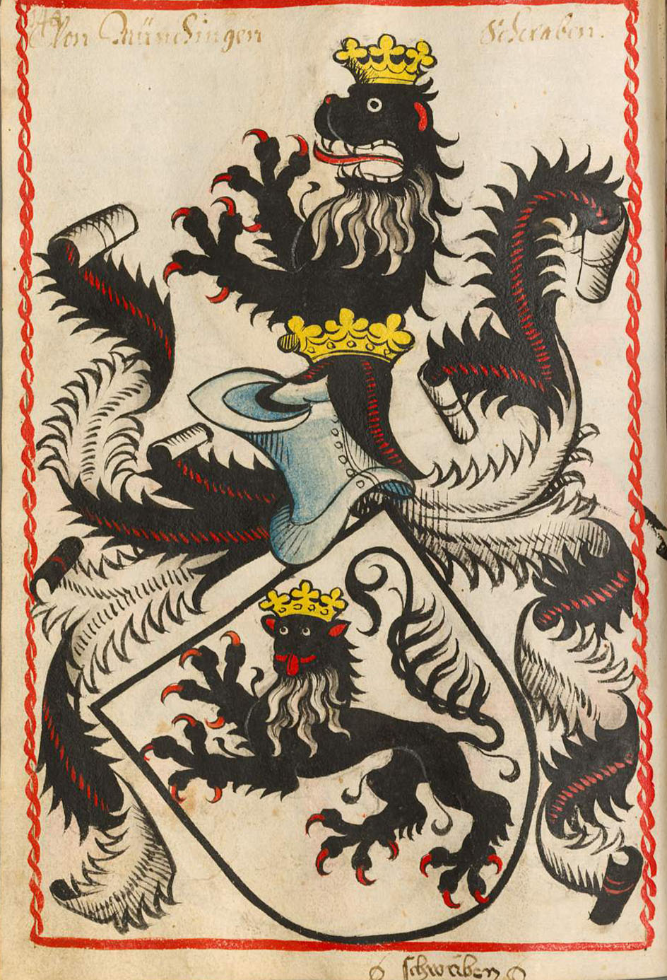 Scheibler'sches Wappenbuch, älterer Teil Wappen der Familie Münchingen.